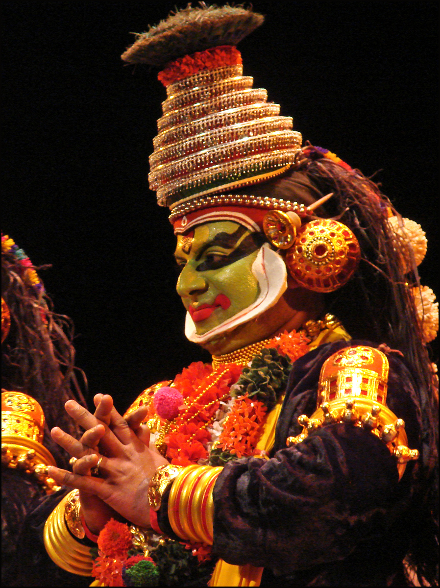 Le krishnattam ou krishnanattam – selon la transcription phonétique du sanscrit – une forme spectaculaire rituelle, gardant valeur d’offrande, dans le temple de Guruvayur, au Kerala, se traduirait par « le jeu de Krishna ». Le personnage central, Krishna, un avatar du dieu Vishnu, lui même considéré comme une divinité primordiale, s’exprime par la musique, le chant, la danse et des gestes d’une grande élégance. Krishnanattam Spectacle rituel du Kerala (Inde) par la troupe du grand temple de Guruvayur sous la direction du Maître M. Sankaranarayanan à la Maison des cultures du monde pour le 14è festival de l'imaginaire